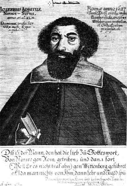 Josephus Adjutus auf einem Holzschnitt vom 16. Januar 1647 von Johann Michael Dilherz